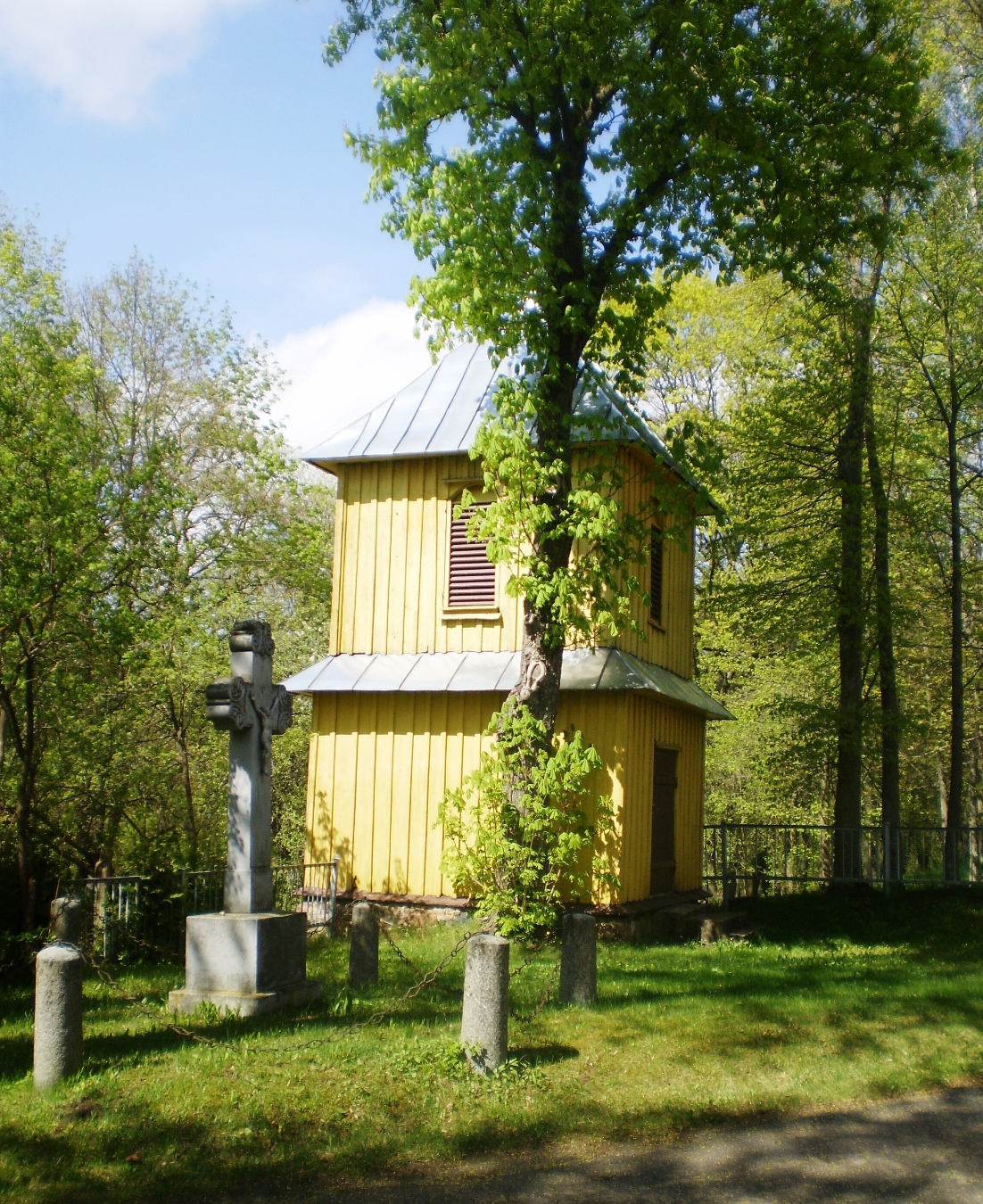 Šventybrasčio bažnyčios varpinė, Kėdainių raj.